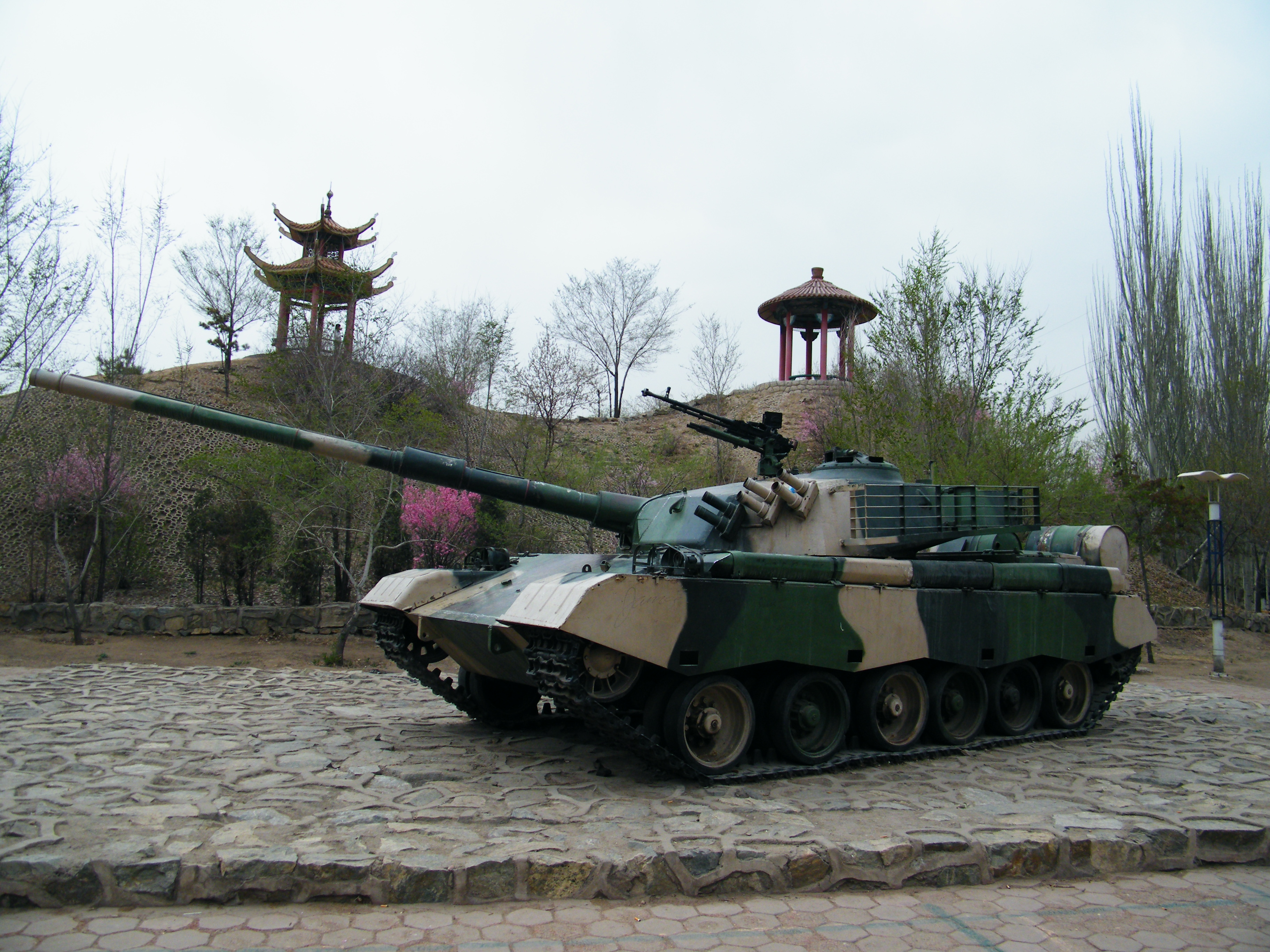 鳄鱼湖公园的“风暴”-Ⅱ坦克样车